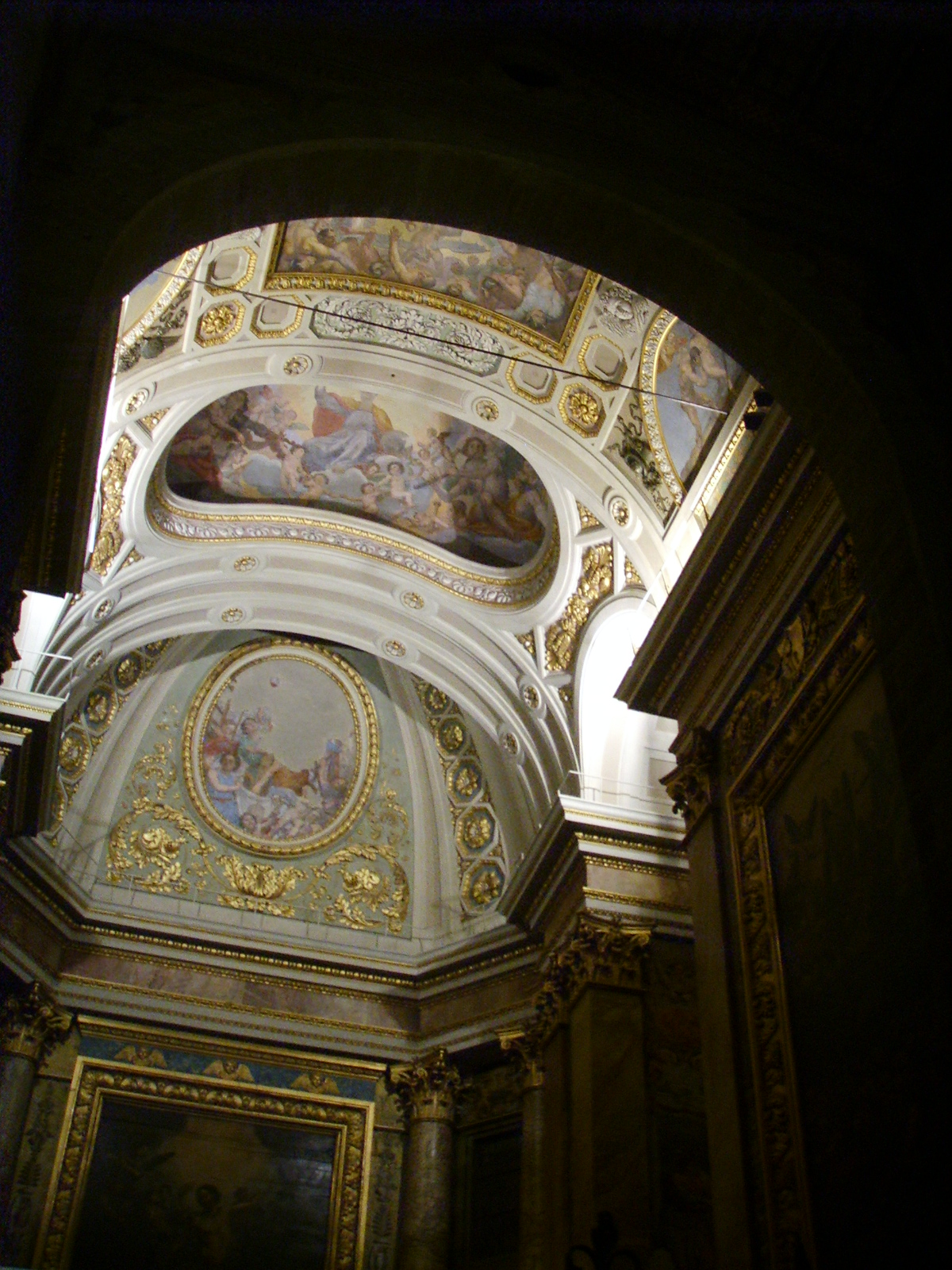 Pistoia, duomo, volta